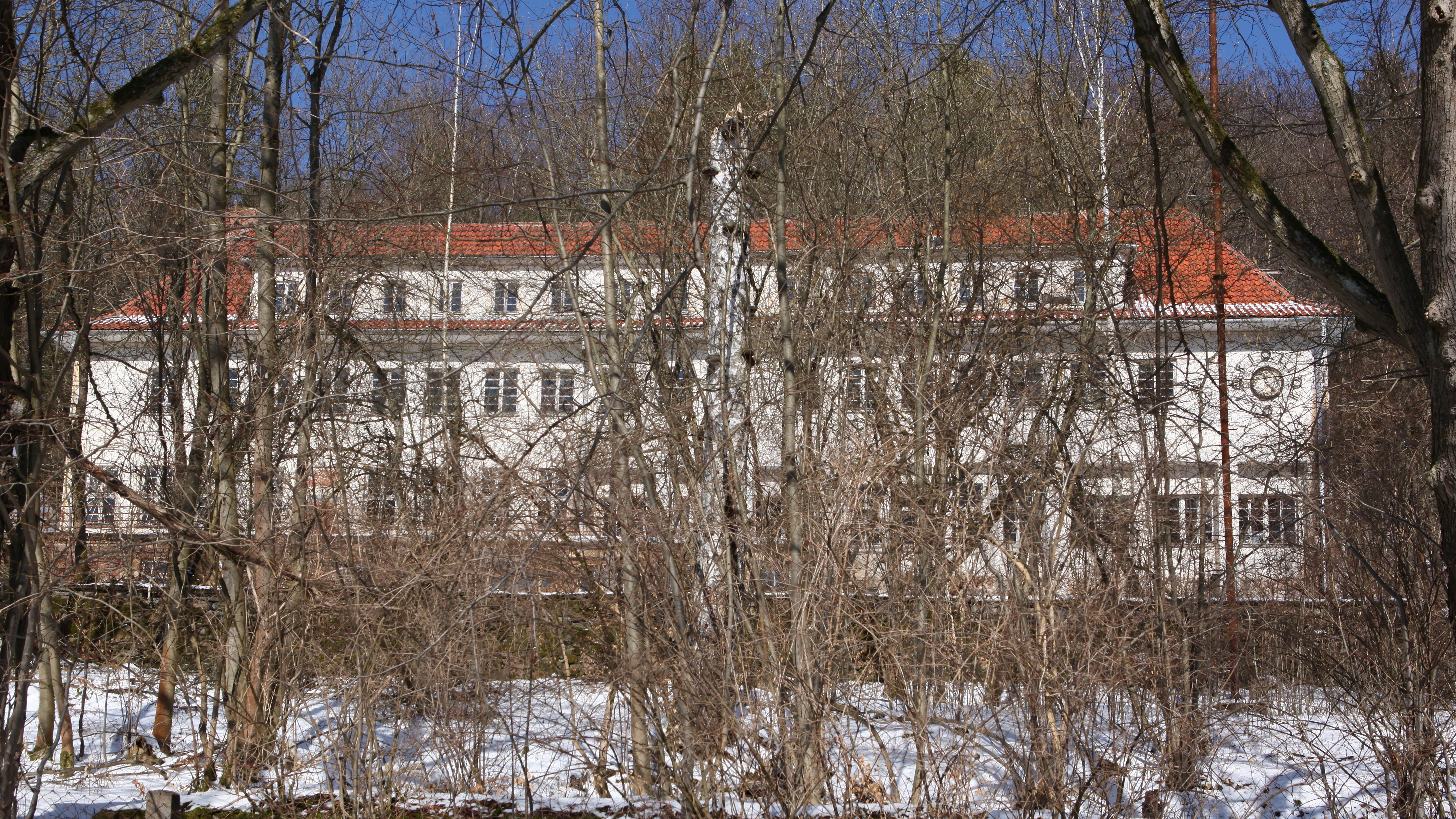 Ehemalige TBC-Heilstätten in Wehd Forschengereuther Straße 136, OT von Sonneberg